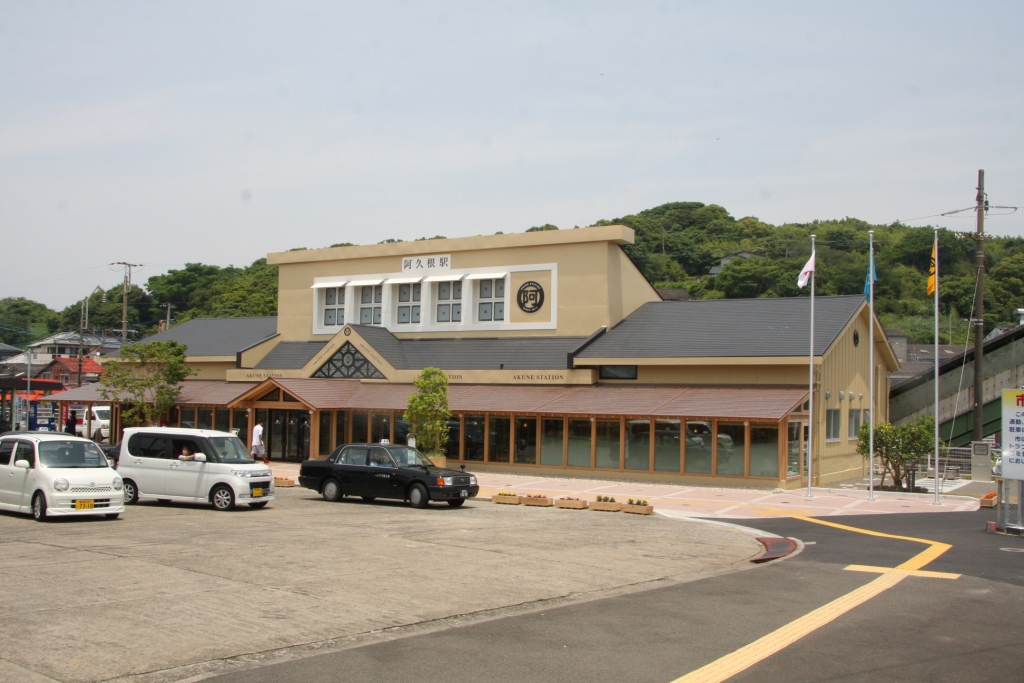 肥薩おれんじ鉄道阿久根駅